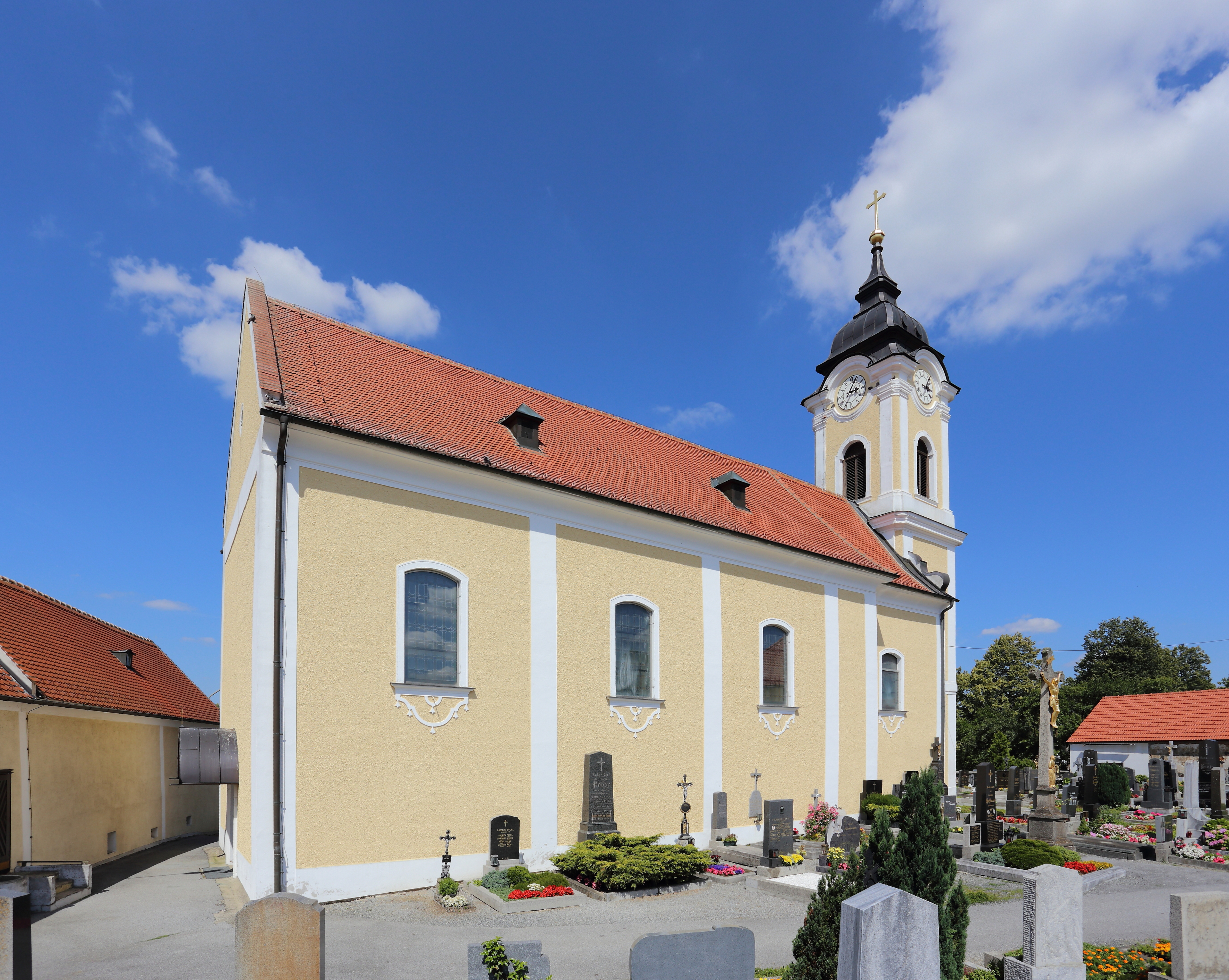 Katholische Pfarrkirche hl. Johannes der Täufer in Blumau an der Wild, ein Ortsteil der niederösterreichischen Marktgemeinde Ludweis-Aigen. Eine spätbarocke Saalkirche mit Ostturm, die Abt Paul Gratschmayr um 1750 errichten ließ.